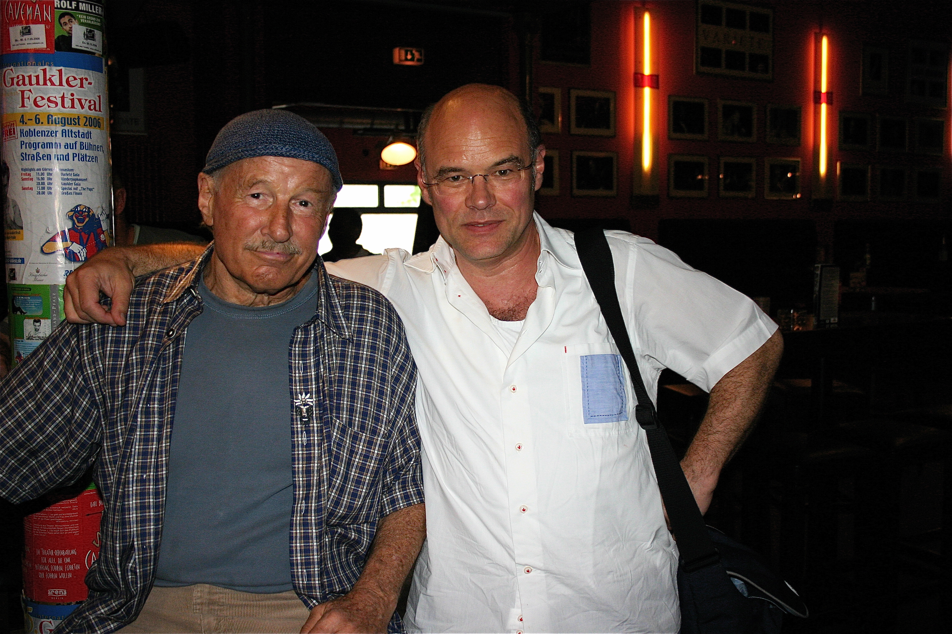 Meeting with my Mentor